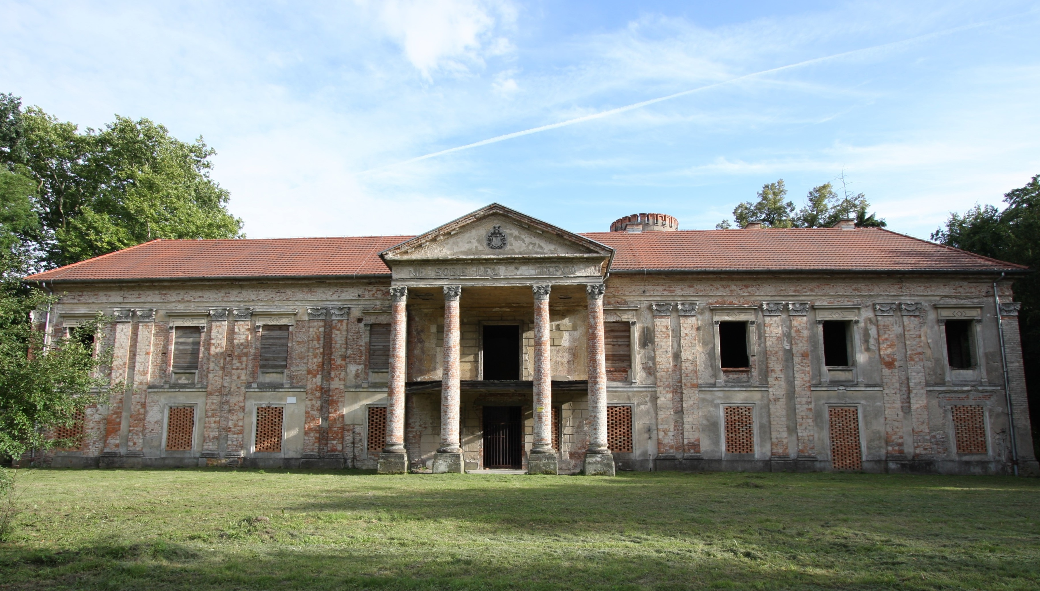 Chobienice, pałac, mur., pocz. XIX